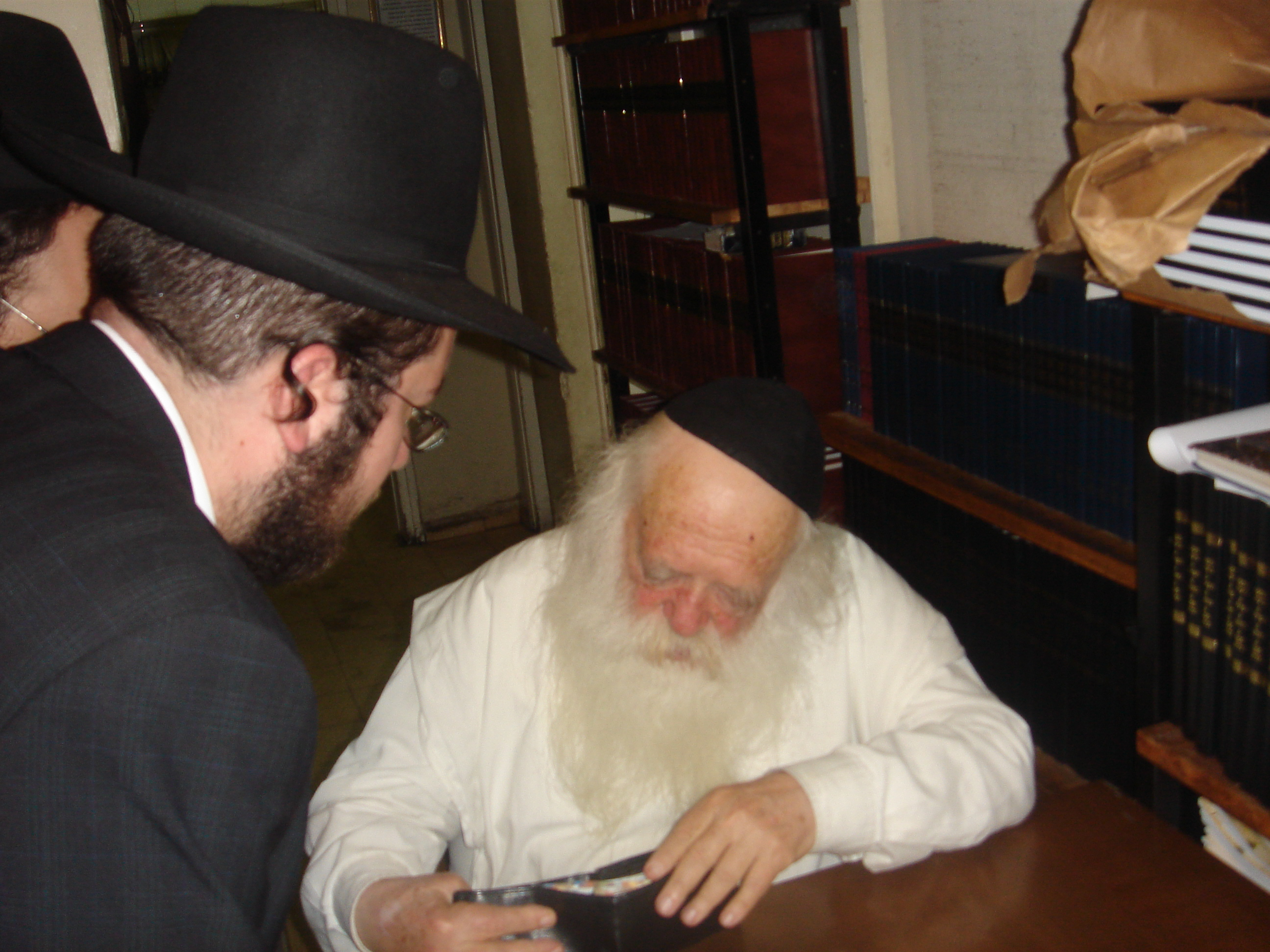 rabbi chaim kanievsky